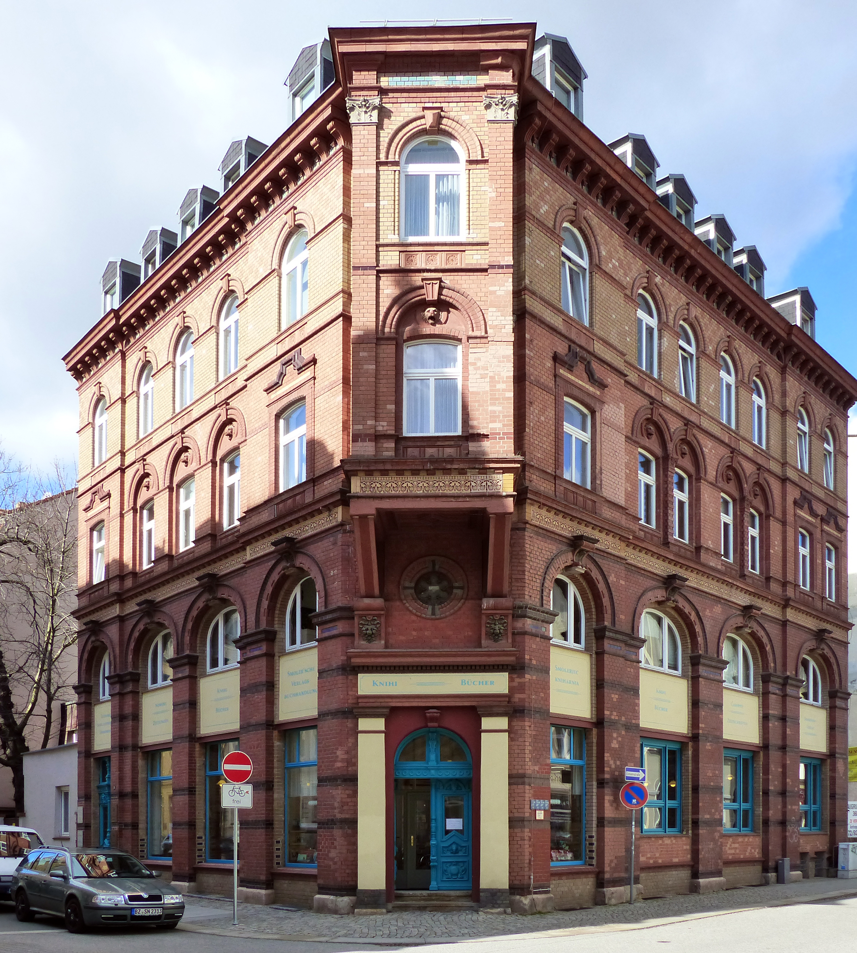 Denkmalgeschütztes Gebäude, Tuchmacherstraße 27, Bautzen. Sitz des Domowina-Verlages und der Smolerschen Verlagsbuchhandlung. Hornjoserbsce: Sukelnska hasa 27 w Budyšinje. Sydło Ludoweho nakładnistwa Domowina a Smolerjec kniharnje.